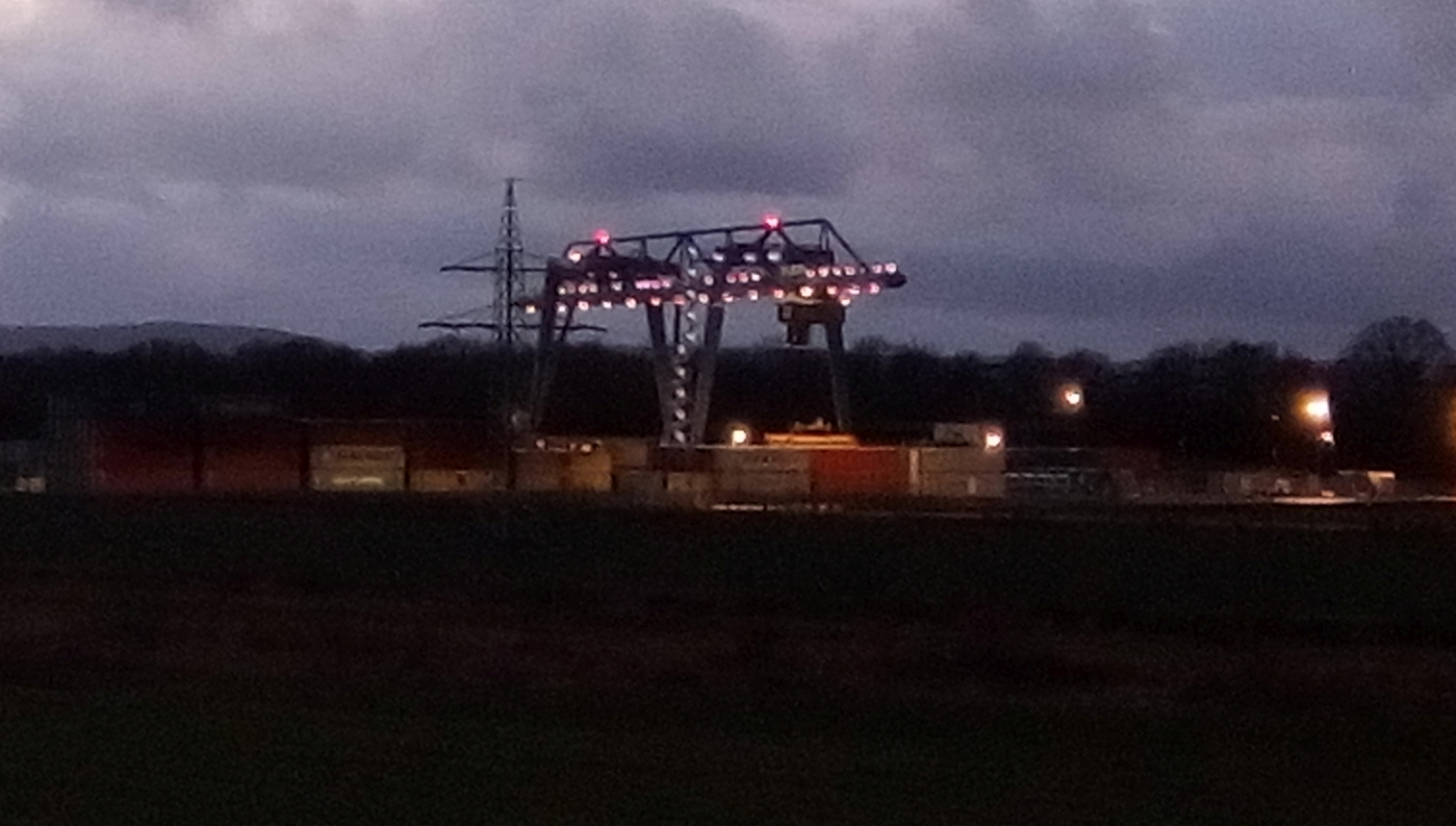 Weser Regio Port in Minden Päpinghausen am Mittellandkanal